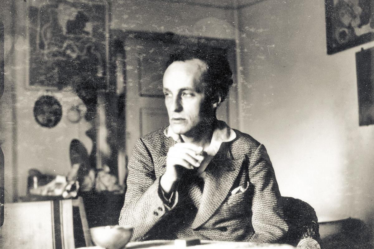 Władysław Strzemiński w 1932 roku